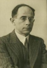 spisovatel Paul Kornfeld